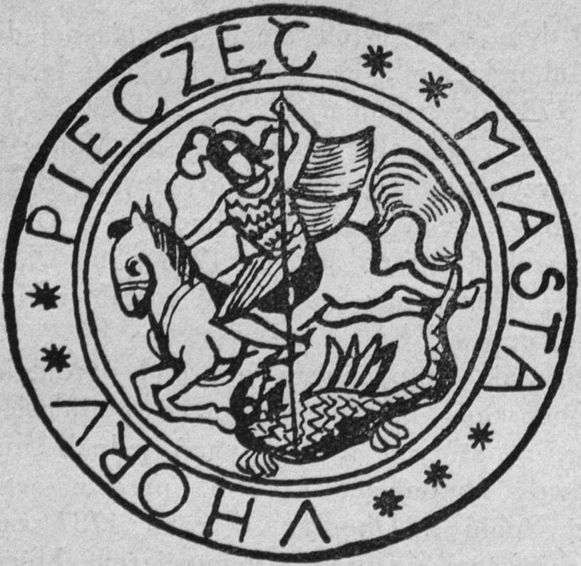 Беларуская (тарашкевіца): Угар (Uhar). Пячаць мястэчка